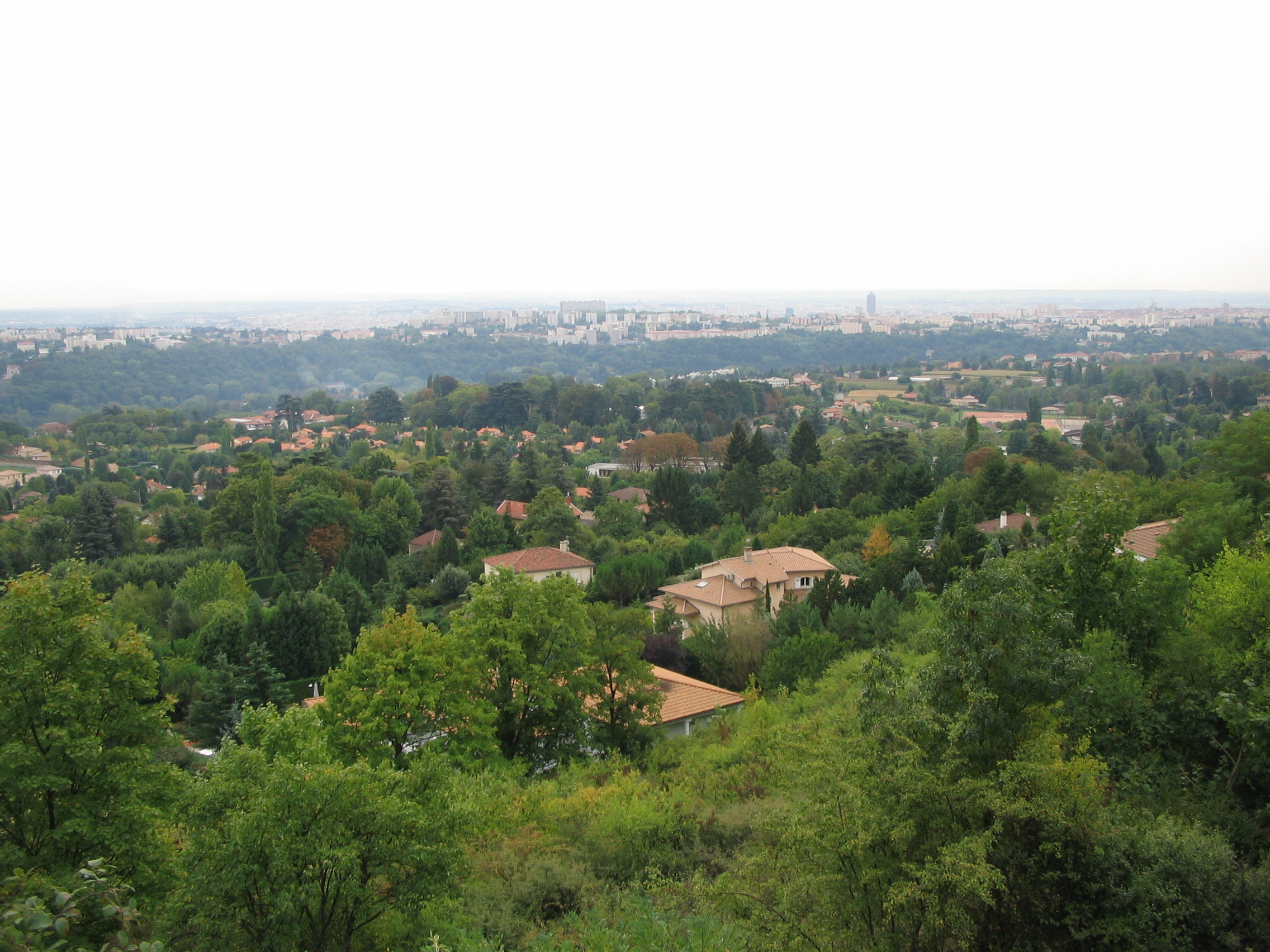 Le nord de l'agglomération lyonnaise en début d'automne.